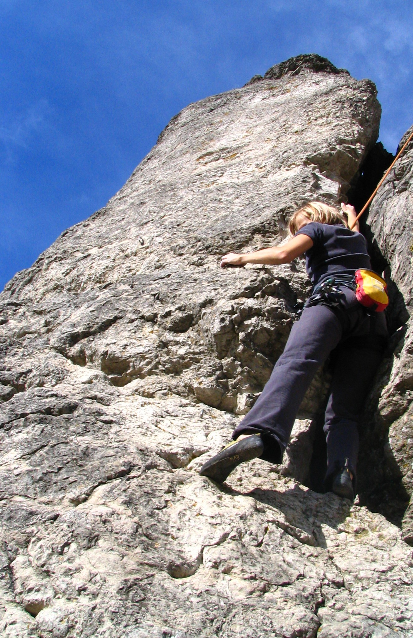 Climbing at Eulenwand, nearby Tiefenellern, Fränkische Schweiz / Franconian Switzerland, Franken / Franconia, Bayern / Bavaria, Deutschland / Germany.